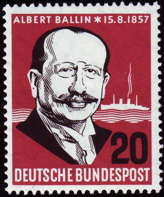 Albert Ballin (1857–1918), armateur allemand